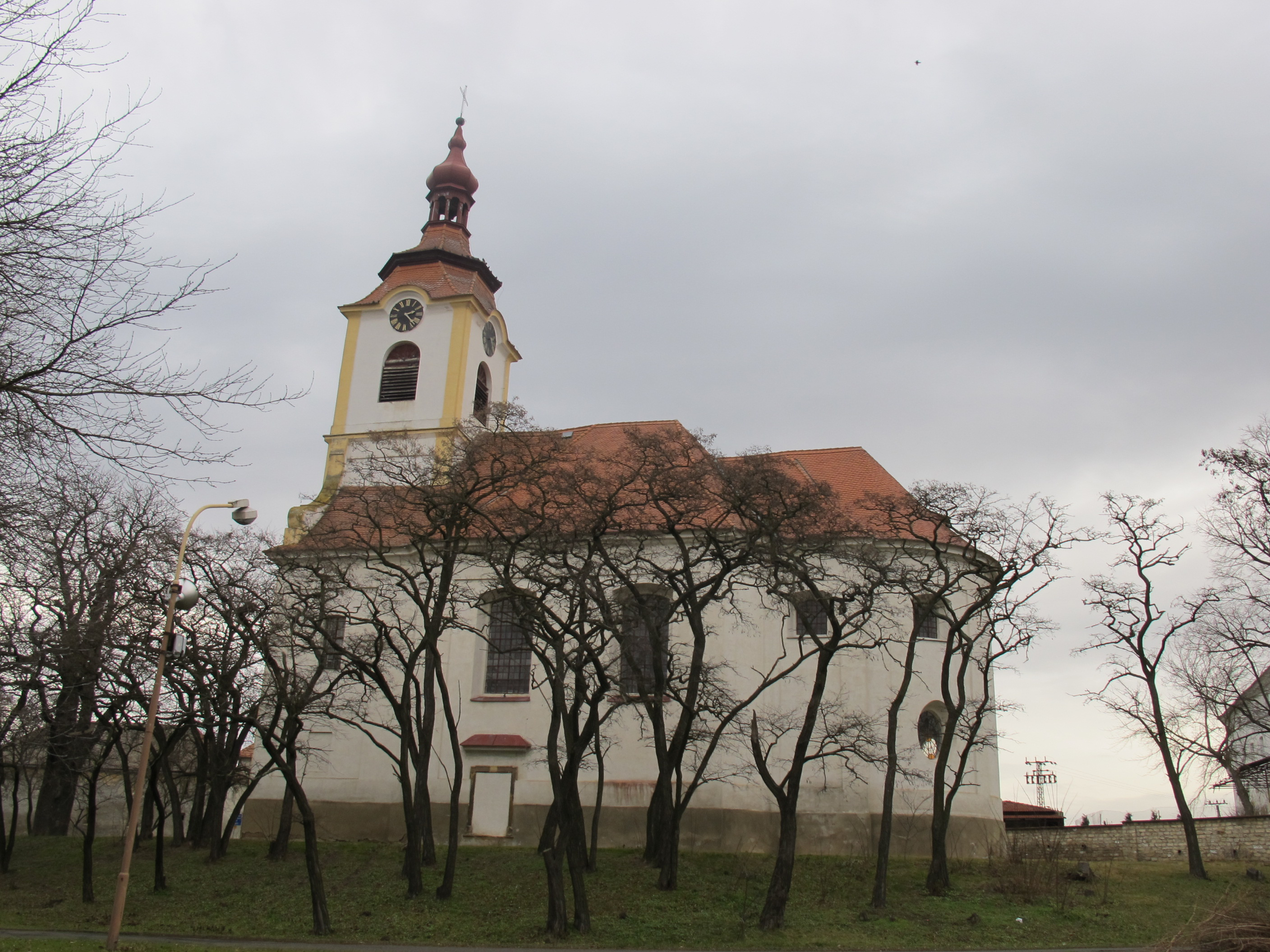 Kostel sv. Prokopa v obci Blažim - celkový pohled od jihu